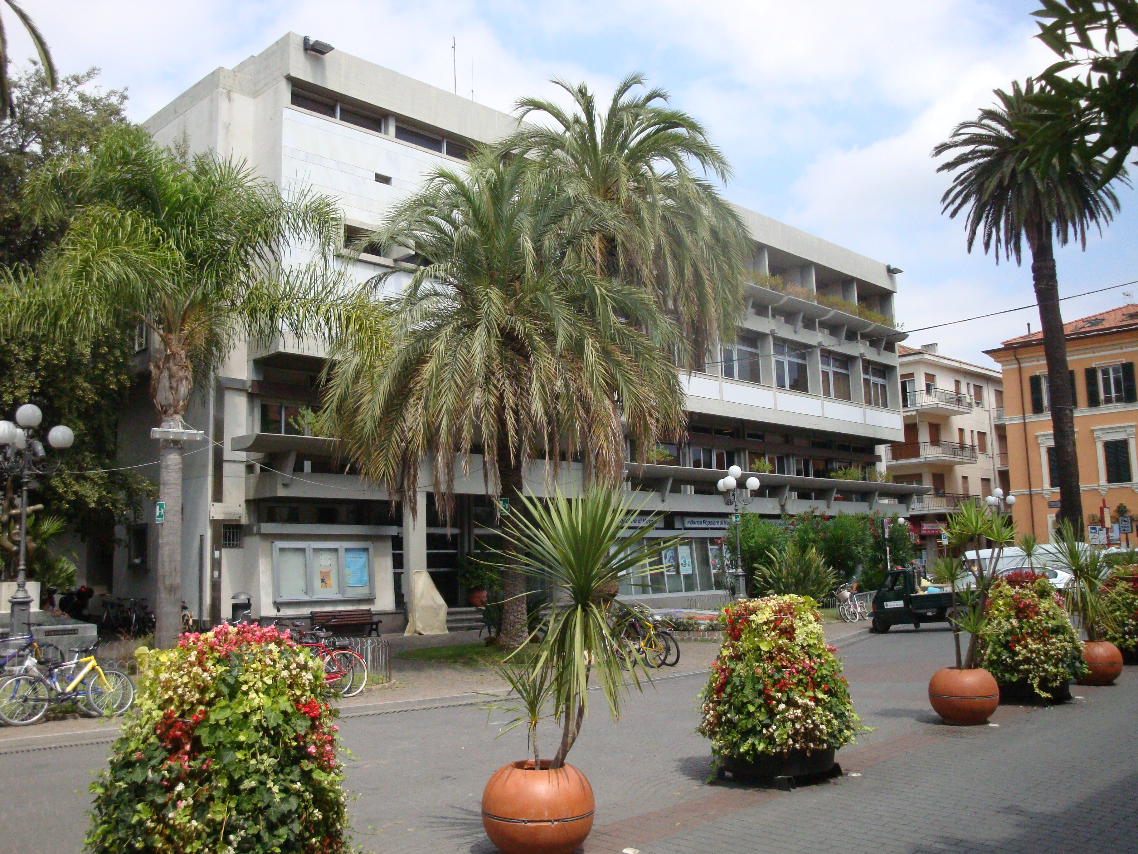 Autore: Tony Frisina - Alessandria